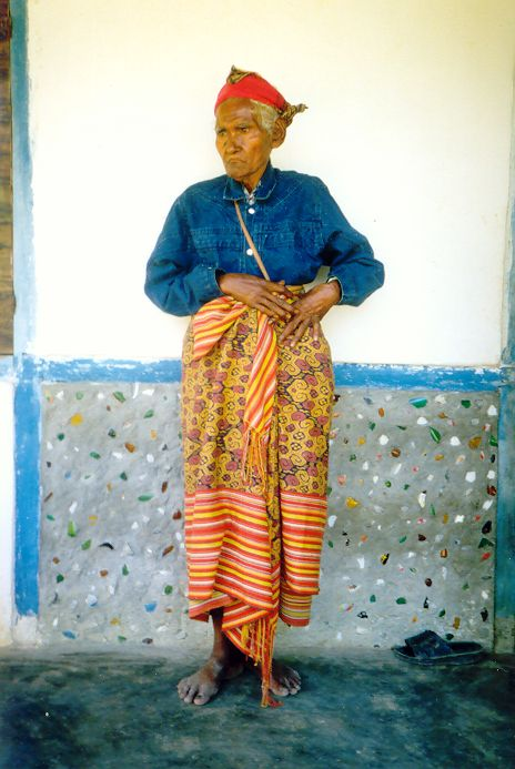 Festliche Männerkleidung, Niki-Niki Un, Zentralamanuban